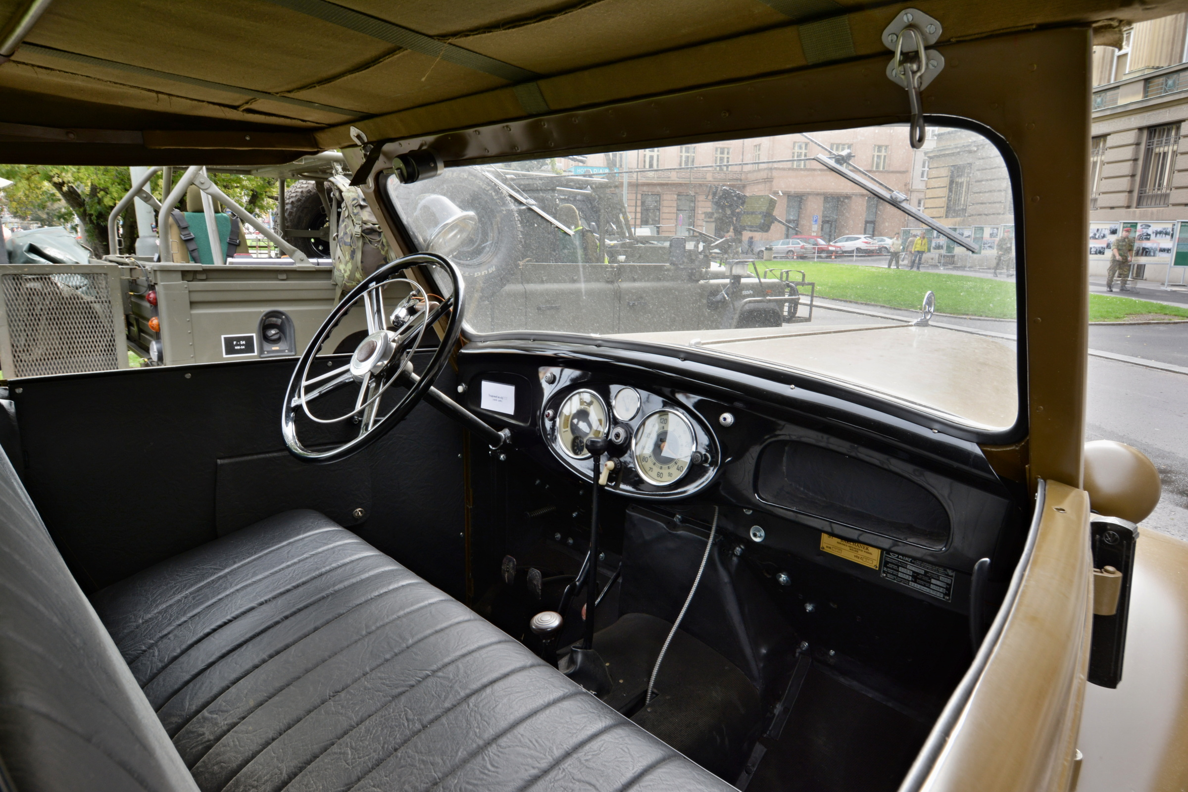 Armádní štábní autmobil Škoda 903, vyráběn v letech 1940-1942. Exponát Vojenského historického ústavu. Vystaveno 14. října 2014 při příležitosti oslav 95. výročí vzniku Generálního štábu AČR.